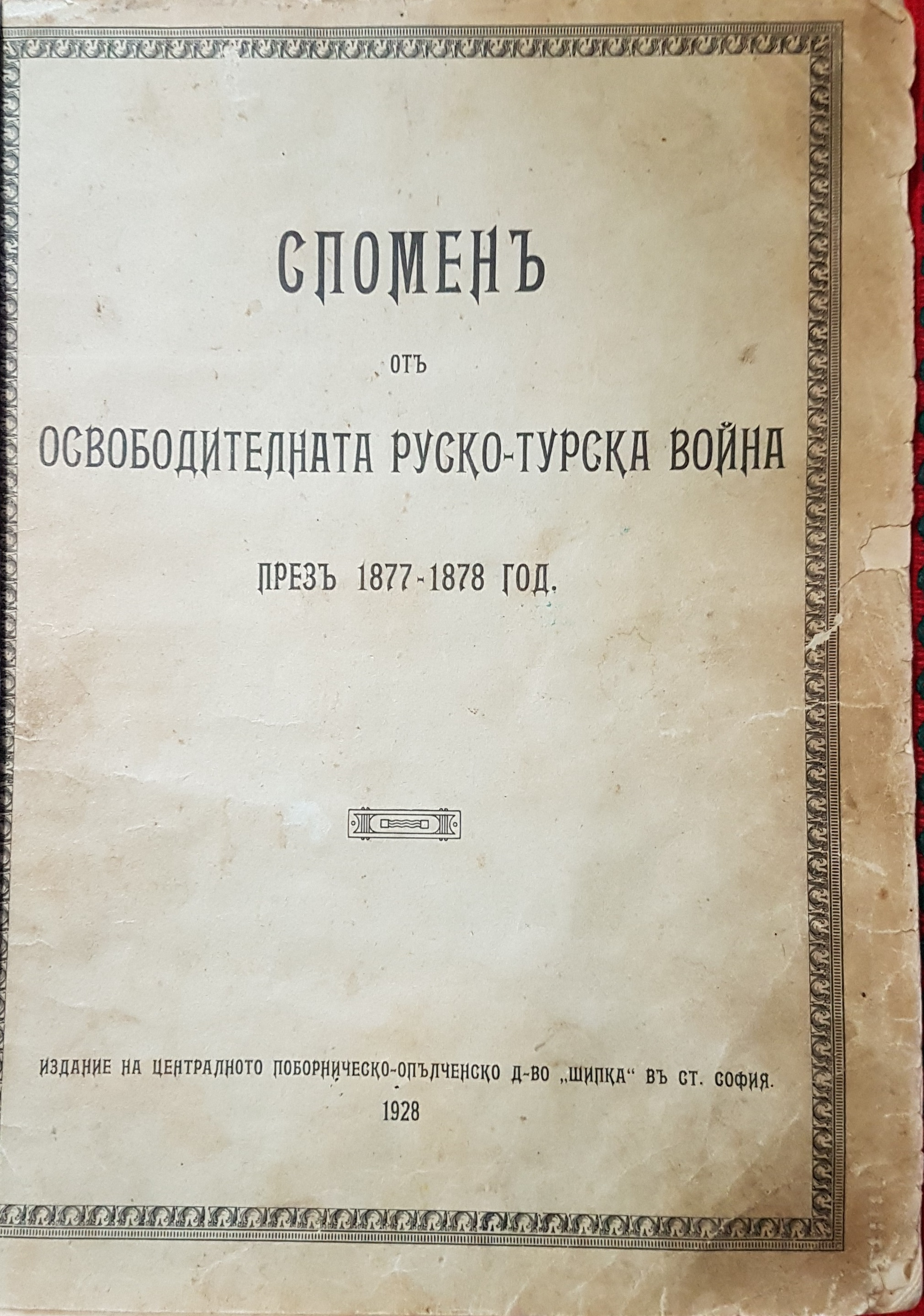 Алманах на българското опълчение